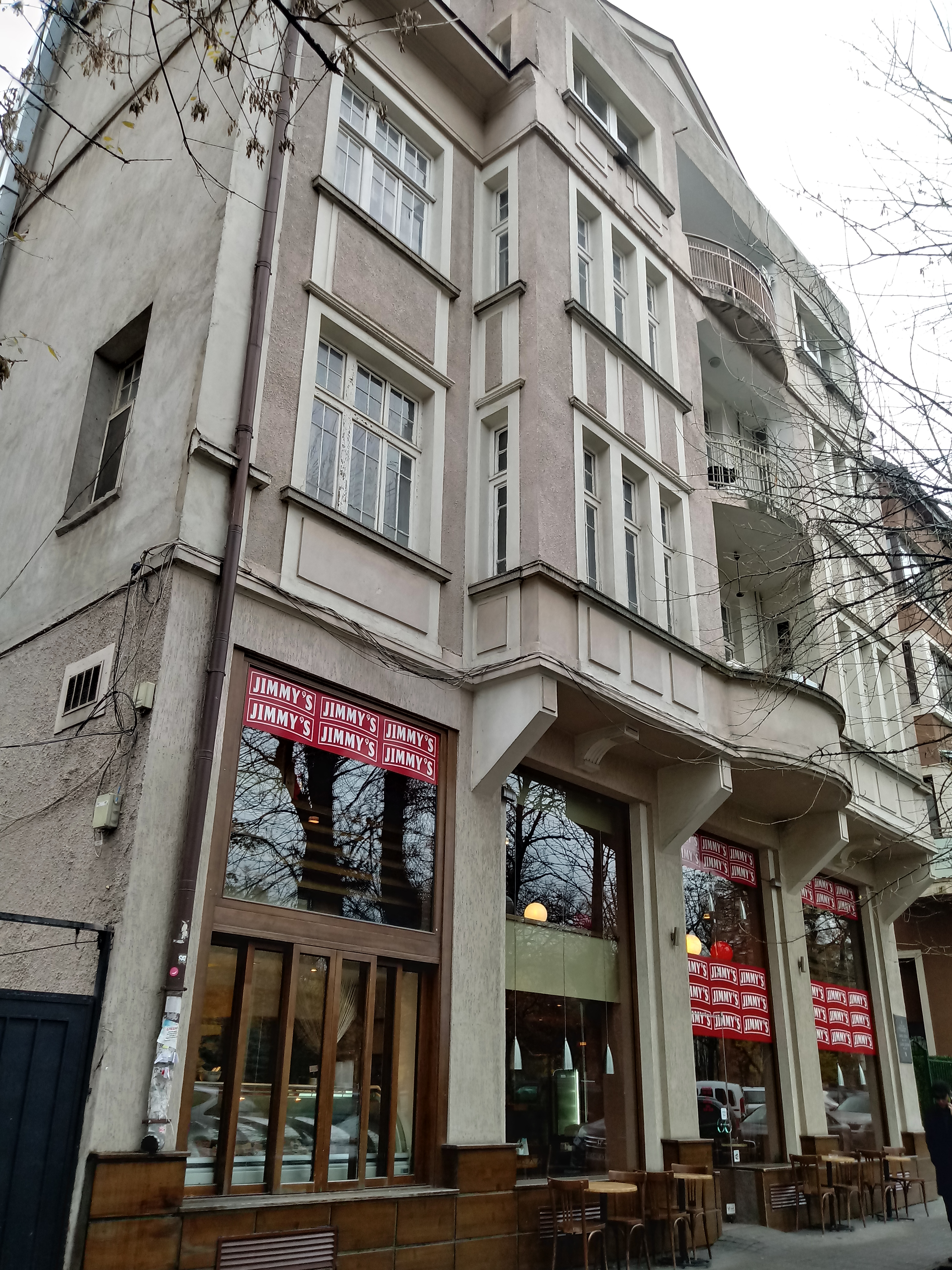 Домът на художниците Борис Денев и Славка Денева на ул. „Шипка“ 18 в София